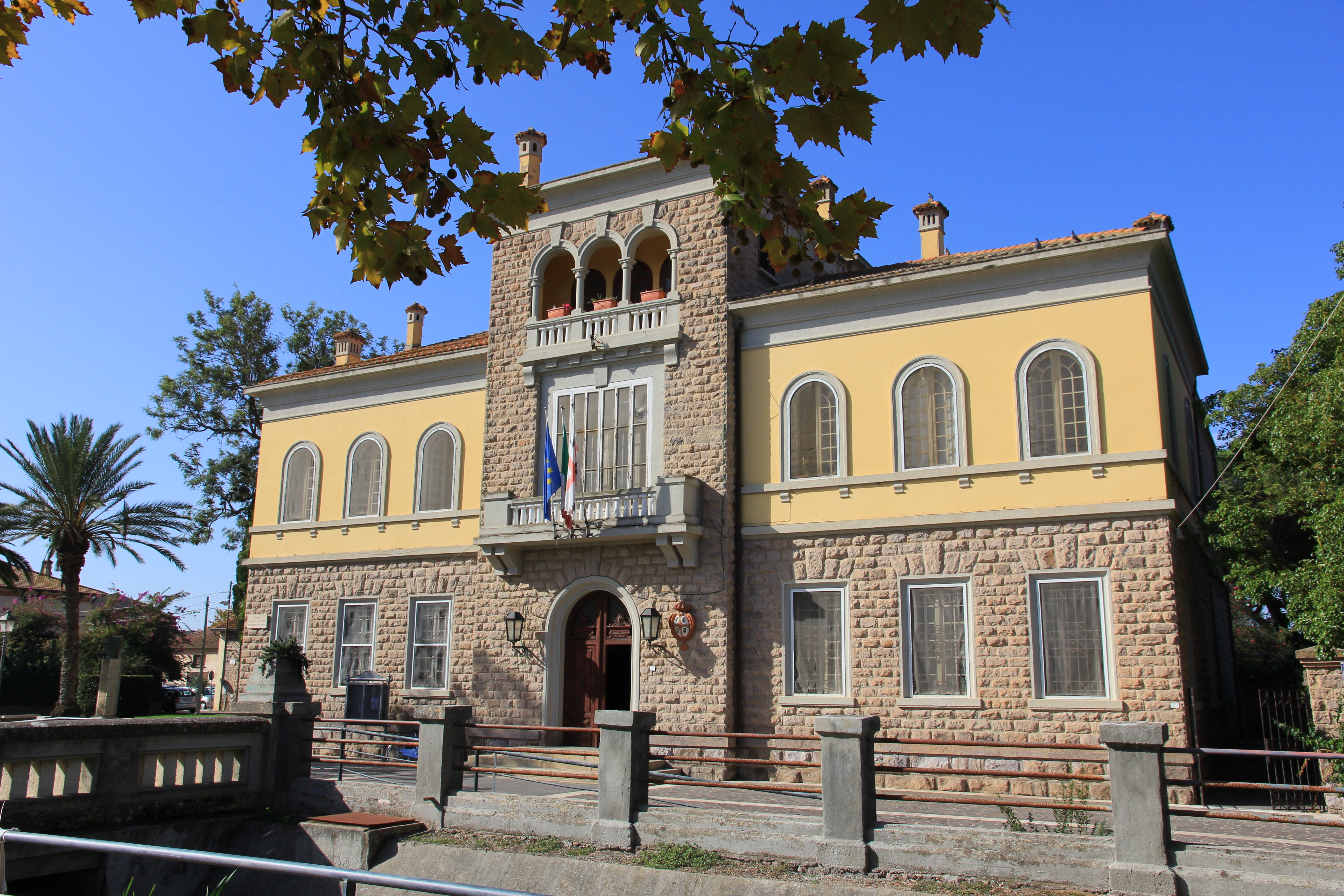 Arborea